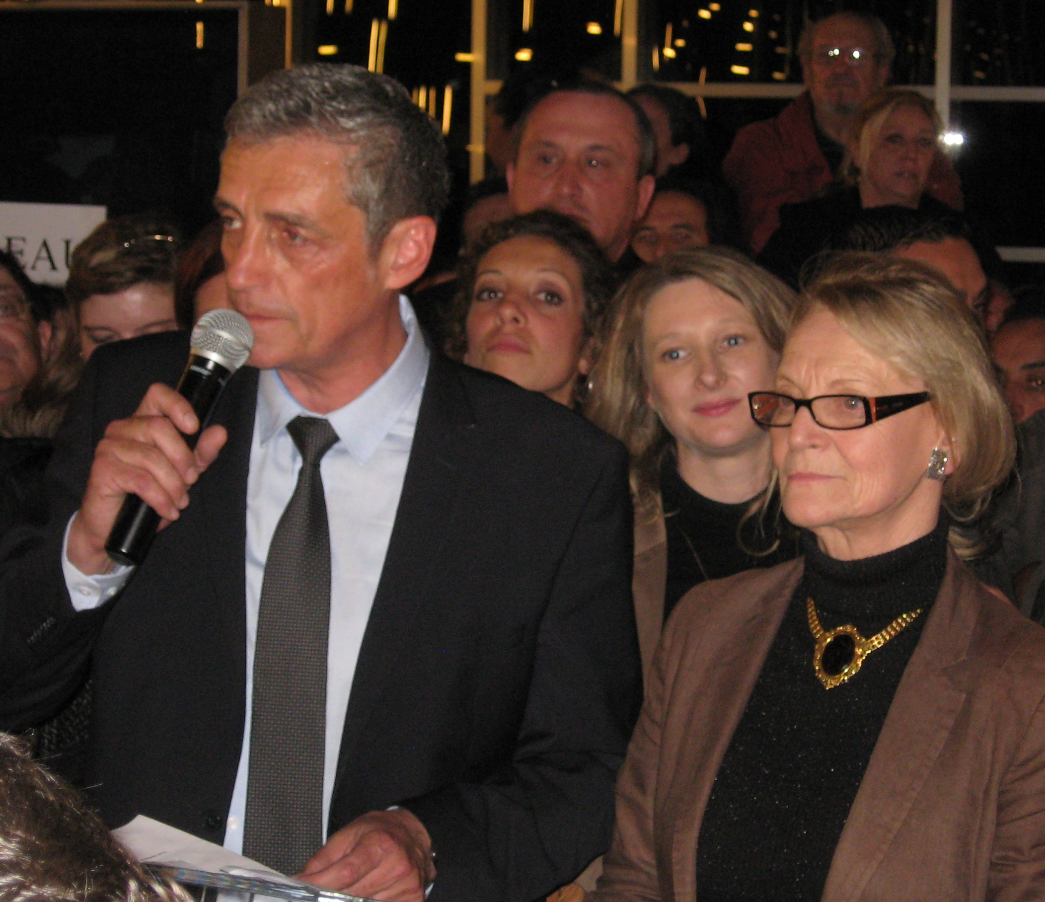 Philippe Saurel, maire de Montpellier en 2014,aux côtés d'Hélène Mandroux, lors du soir de son élection dans le hall de l'hôtel de ville